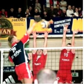 Mostostal vs Czarni Radom. 2000-01 season